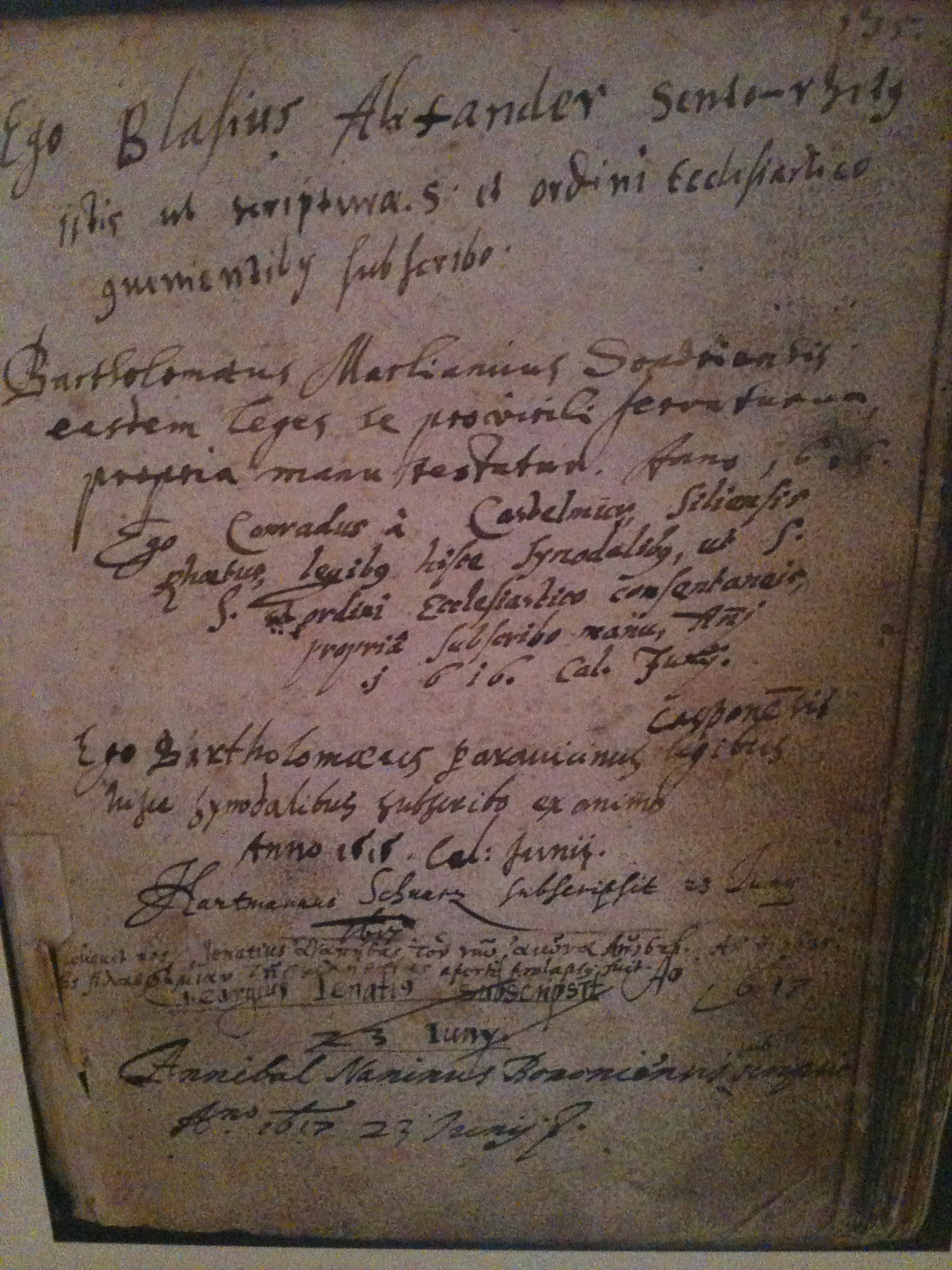 Jörg Jenatsch mit dreinEinträgen im Matrikelbuch der Bündner Synode